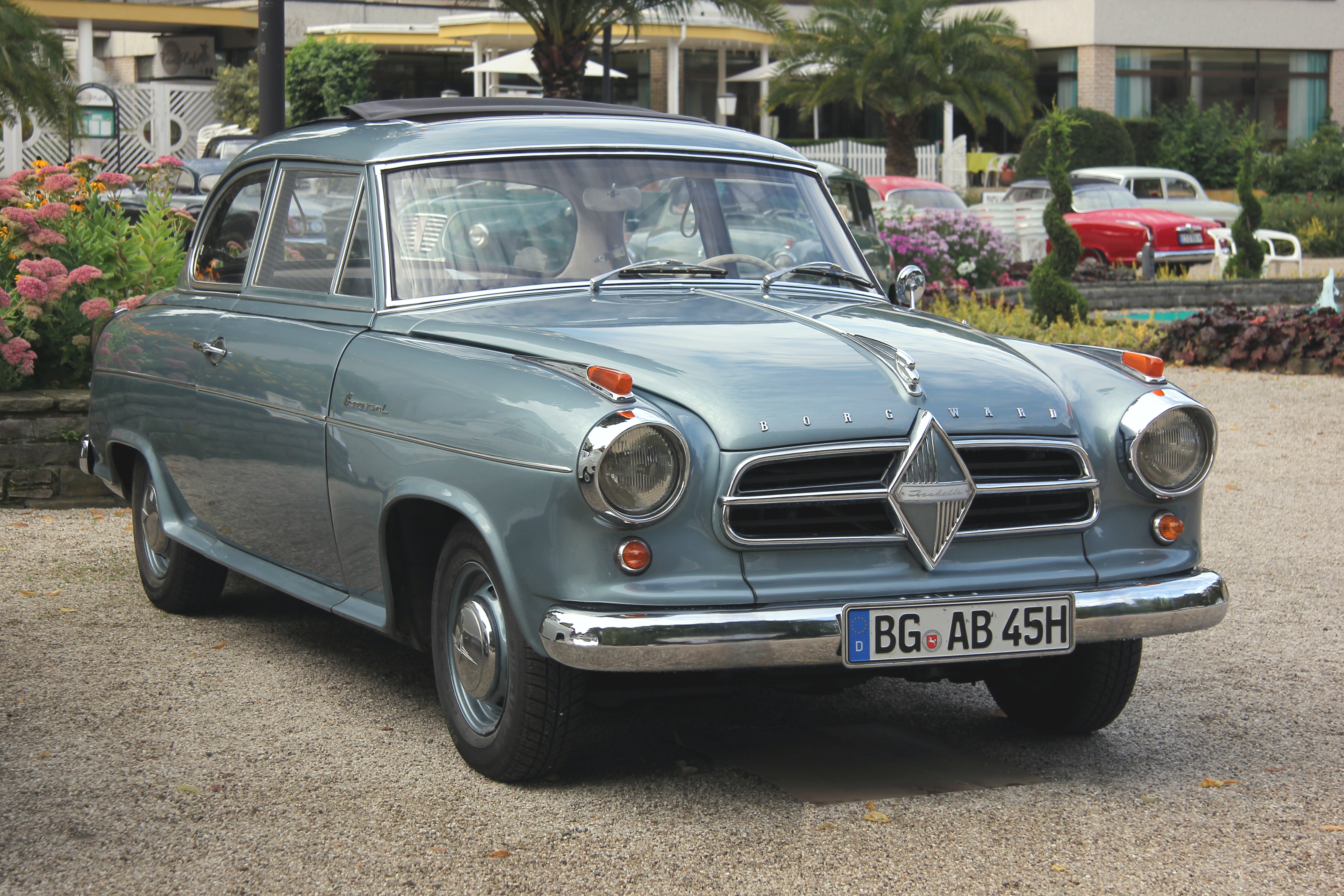 Borgward Isabella, gebaut zwischen Dezember 1956 und August 1958, mit großem Rhombus, aber ohne Kühlschlitze unter dem Kühlergrill (Kennzeichen des Fahrzeugs verändert)